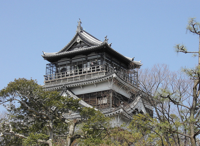 TenshukakuHiroshima castle